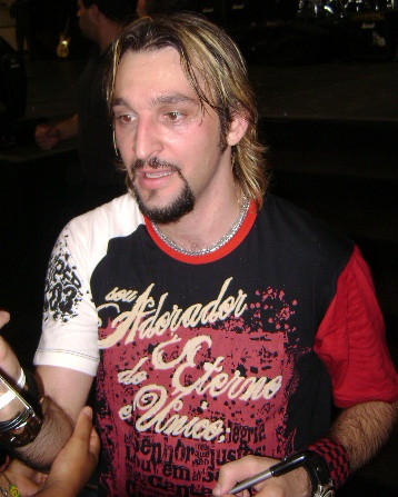 Foto de PG, ex-integrante do Oficina G3